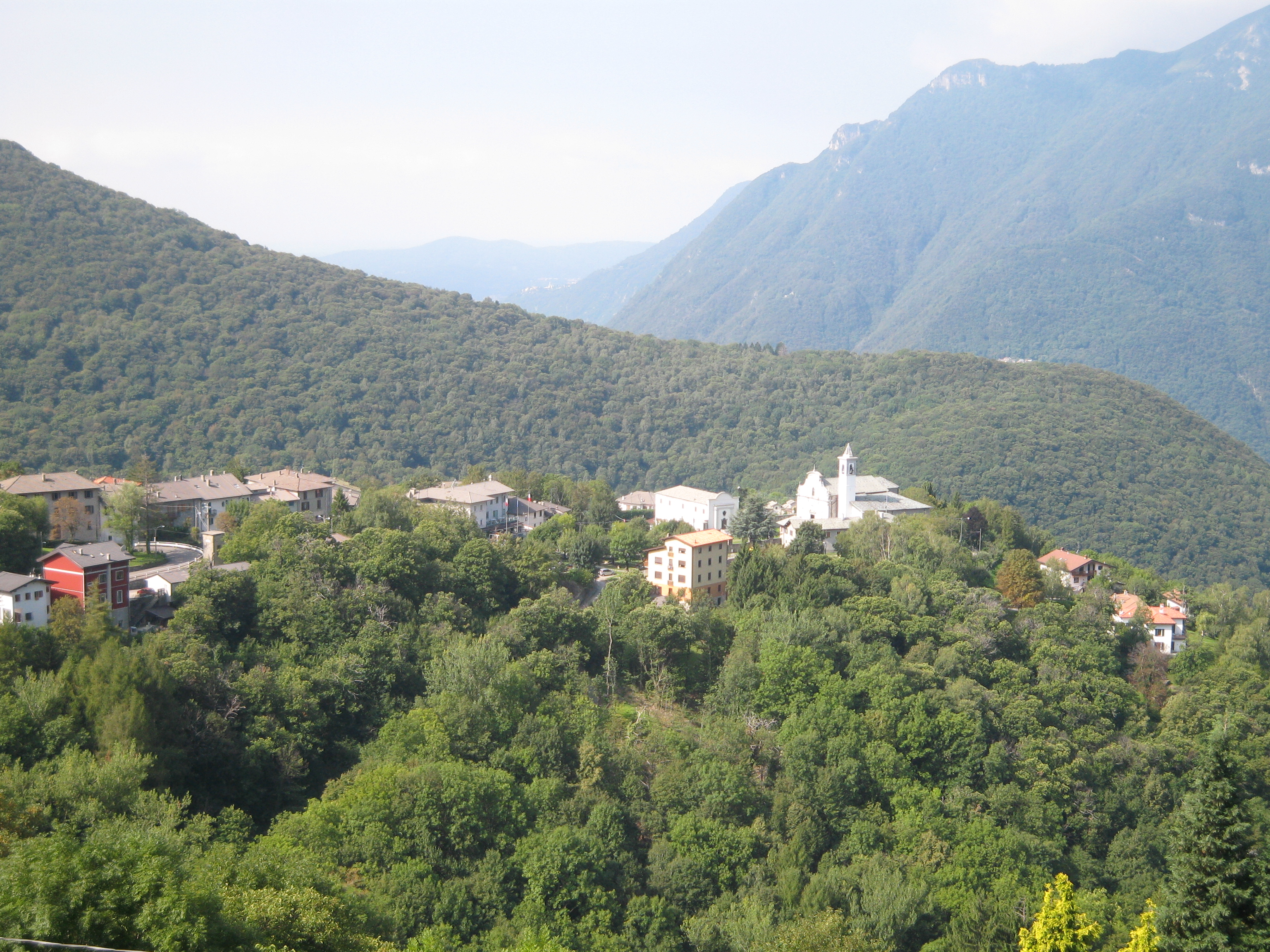 Zelbio da Veleso